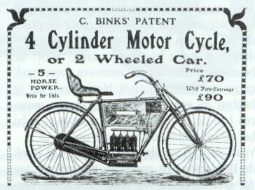 Advertentie van Charles Binks Ltd. (Whitehall Factory, Nottingham) is de naam van een fabrikant van carburateurs die motorfietsen produceerde van 1903 tot 1906.